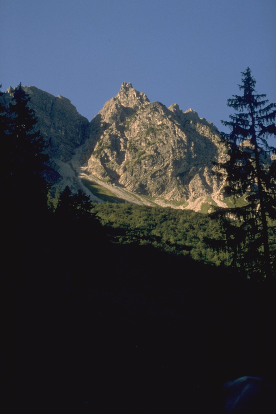 Spichererkopf vom der Eckalpe